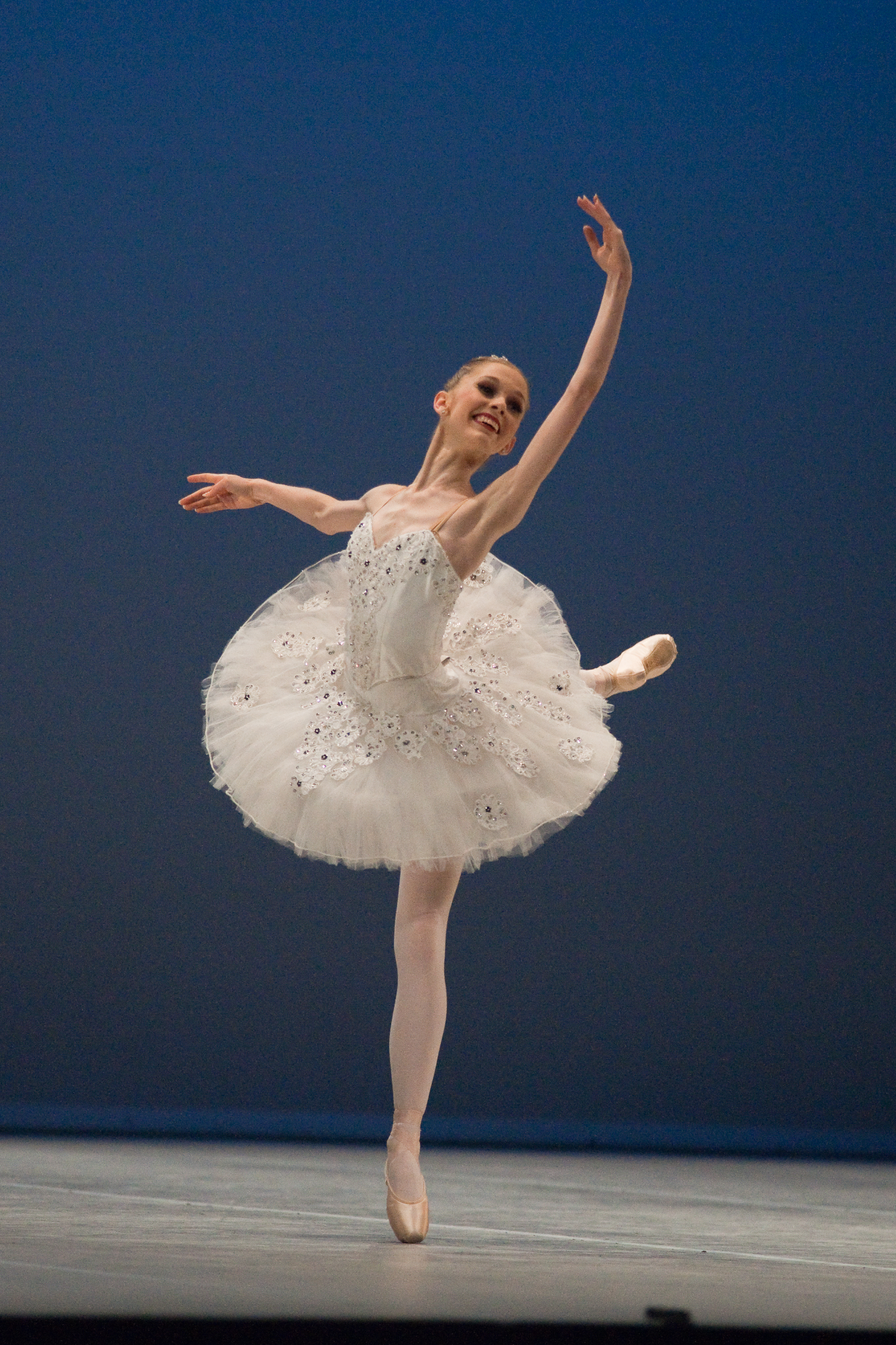 Variation extraite de La Belle au bois dormant au Prix de Lausanne 2010. The making of this document was supported by Wikimedia CH. (Submit your project!) For all the files concerned, please see the category Supported by Wikimedia CH.